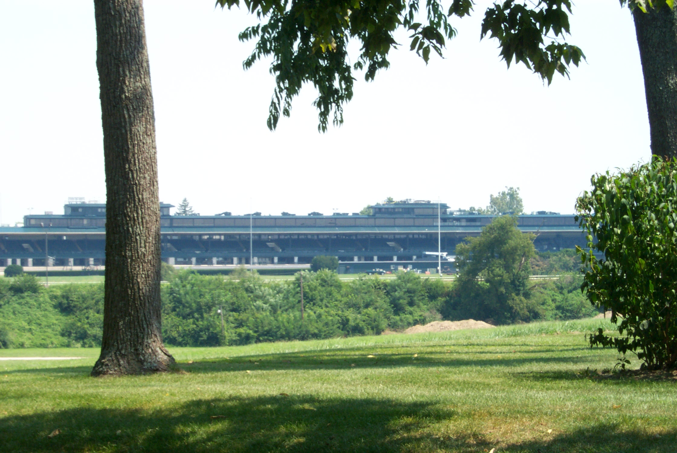 Keeneland Racetrack